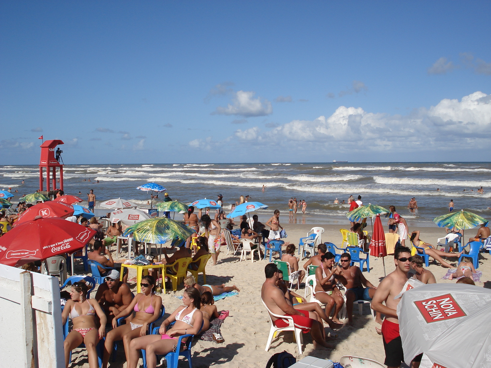 Vista da Praia de Imbé, no município de Imbé, no estado do Rio Grande do Sul, no Brasil.